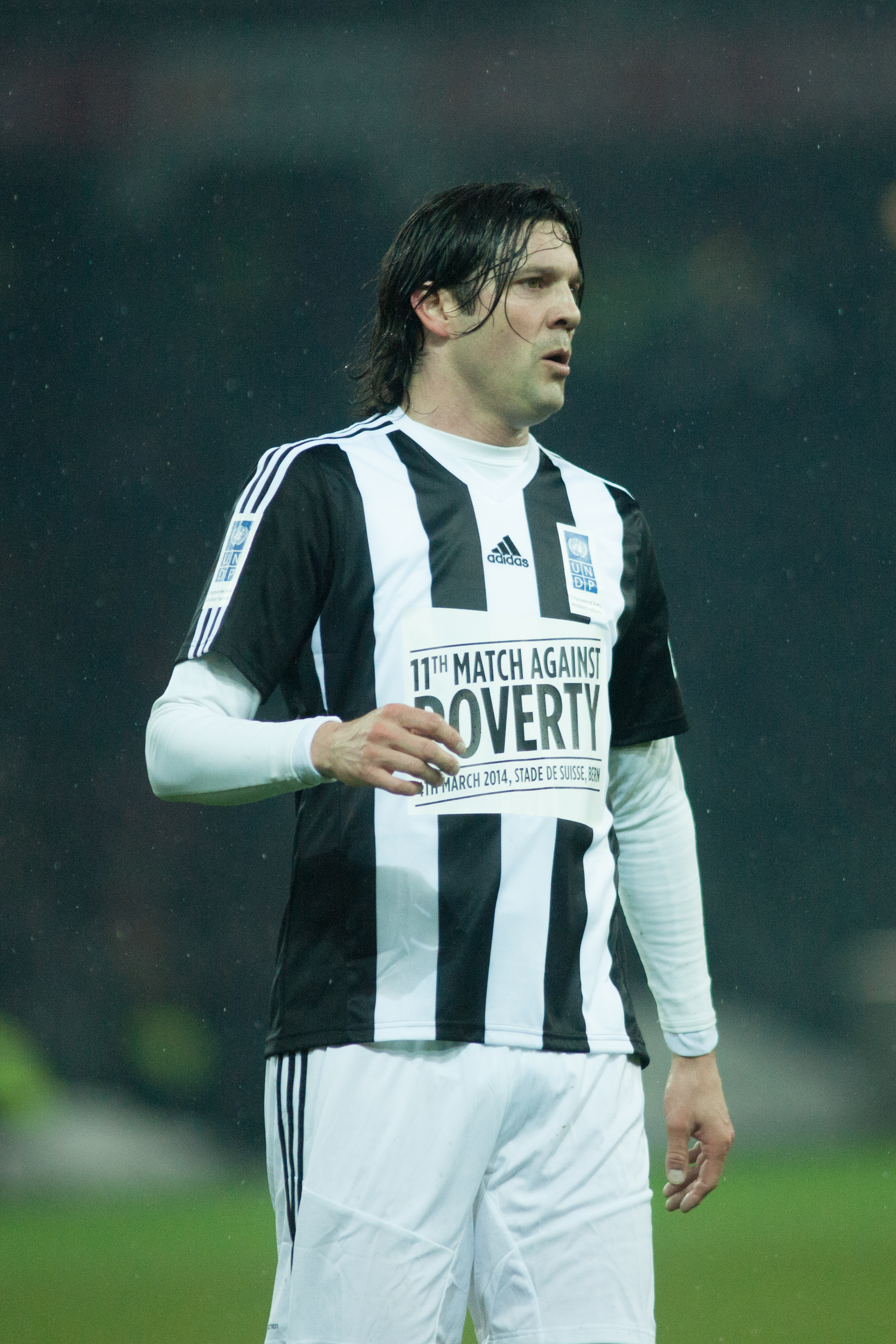 Football against poverty 2014 - Santiago Solari